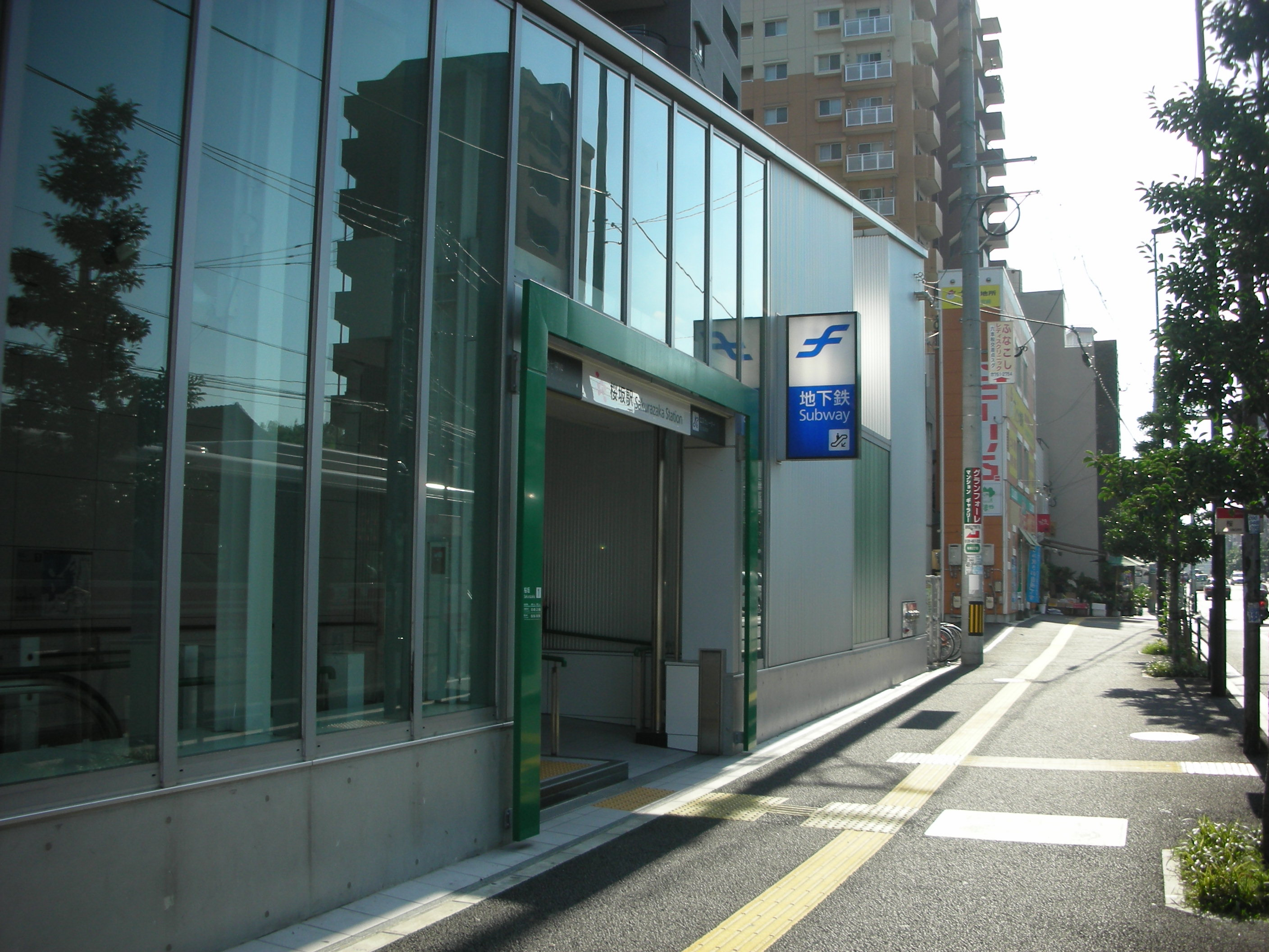 桜坂駅。2006/7/14におんさか自身が撮影